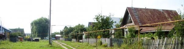 Улица в Климово Ибресинского района